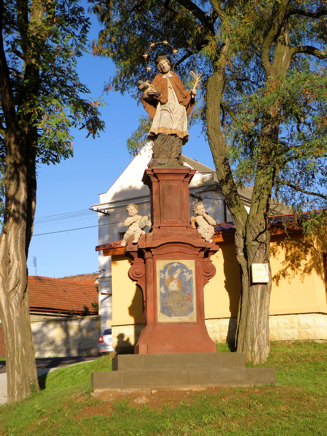 Socha sv. Jana Nepomuckého (Kozly), Kozly - po restauraci v roce 2013, přidání andělíčků